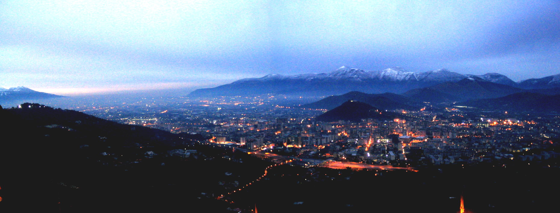 Veduta di Nocera Inferiore da Mont'Albino